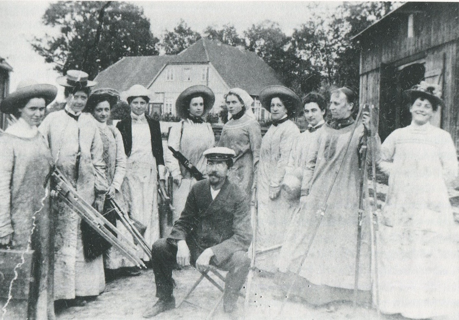 Ernst Eitner mit der Hamburger Malschule Röver 1897 in Neustadt/Holstein (Vierte von links: Alma del Banco)